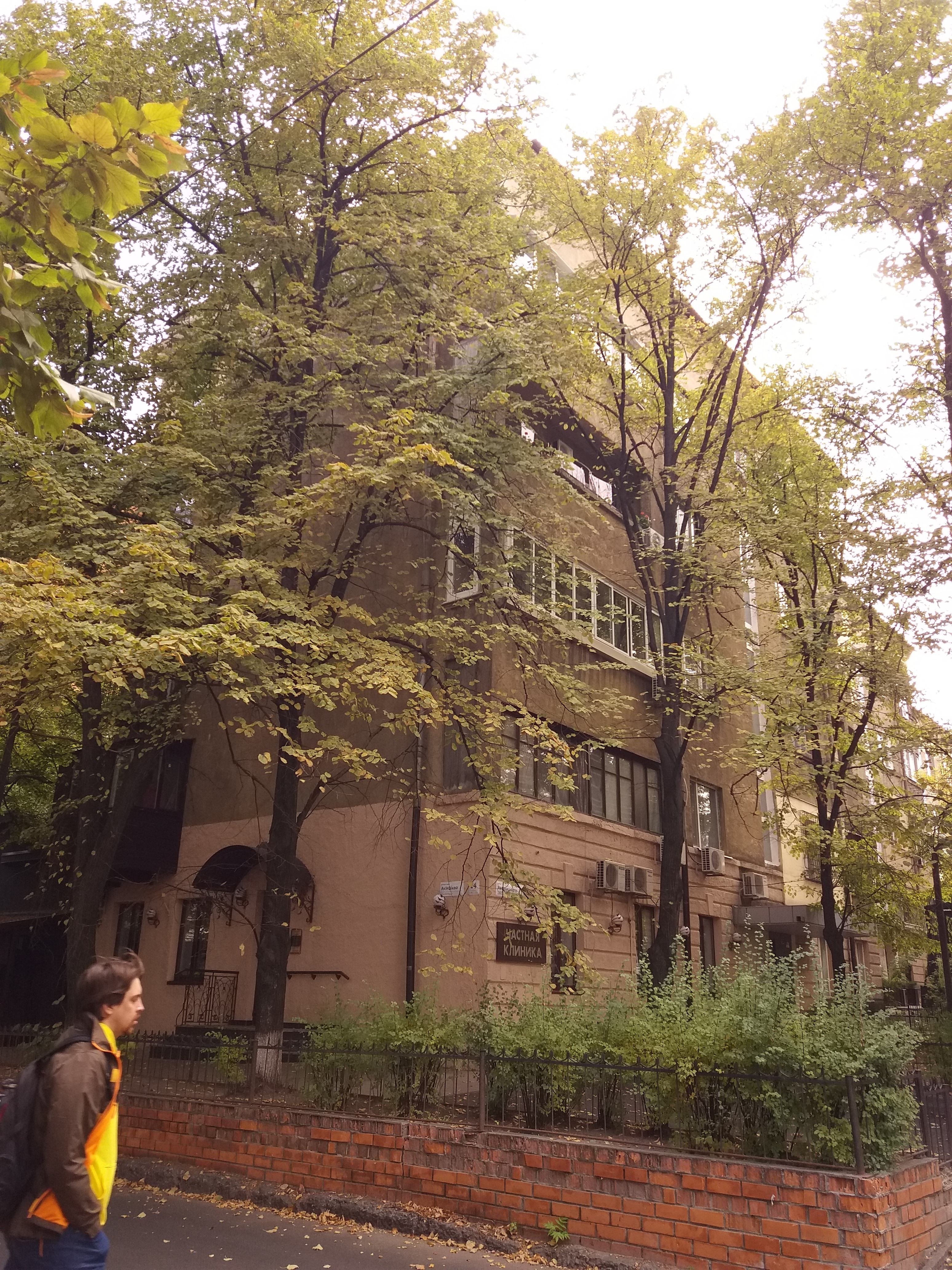 Житловий будинок, Дніпро, вул. Івана Акінфієва (Фучика), 14